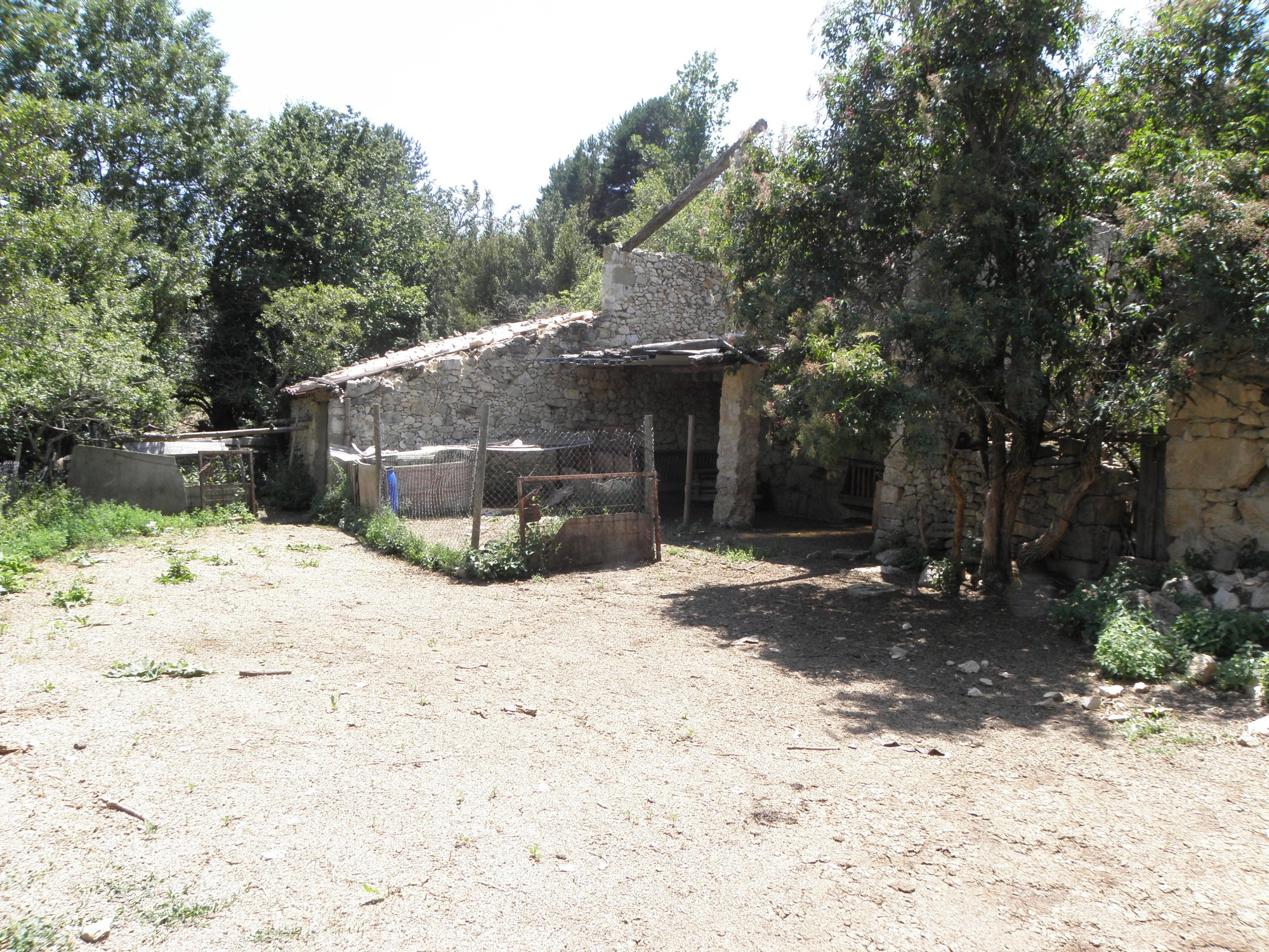 La masia de Cal Culrodó, al poble de la Coma (municipi de la Coma i la Pedra, Vall de Lord, Solsonès) La part exterior del corral, vista des de la façana sud-est de la masia.